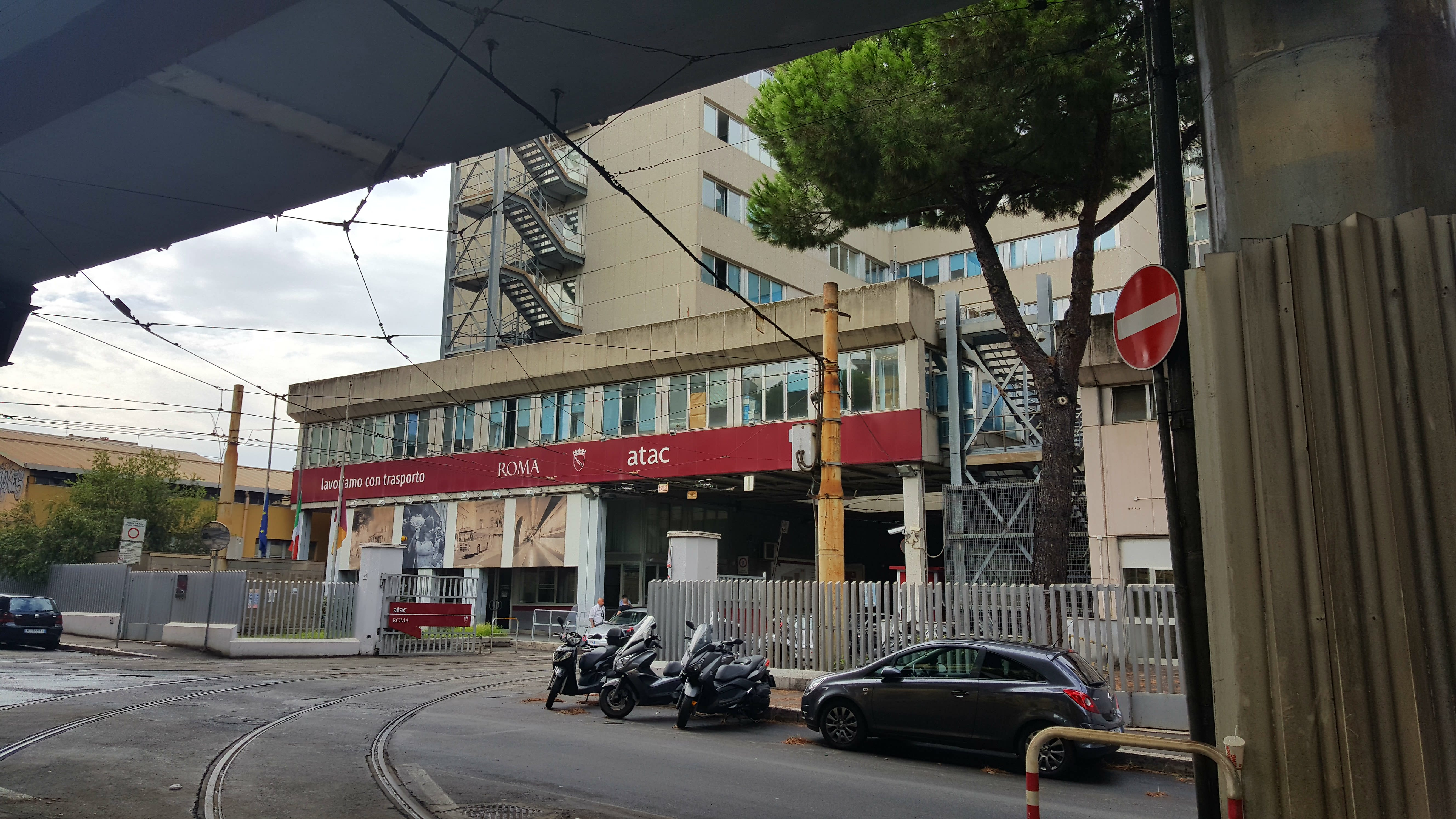 Sede centrale ATAC a Roma, Via Prenestina, 45